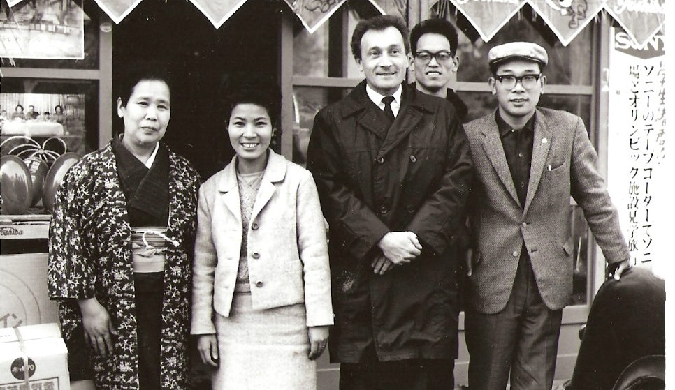 Vladimír Lorenz (Japonsko - rok 1994)